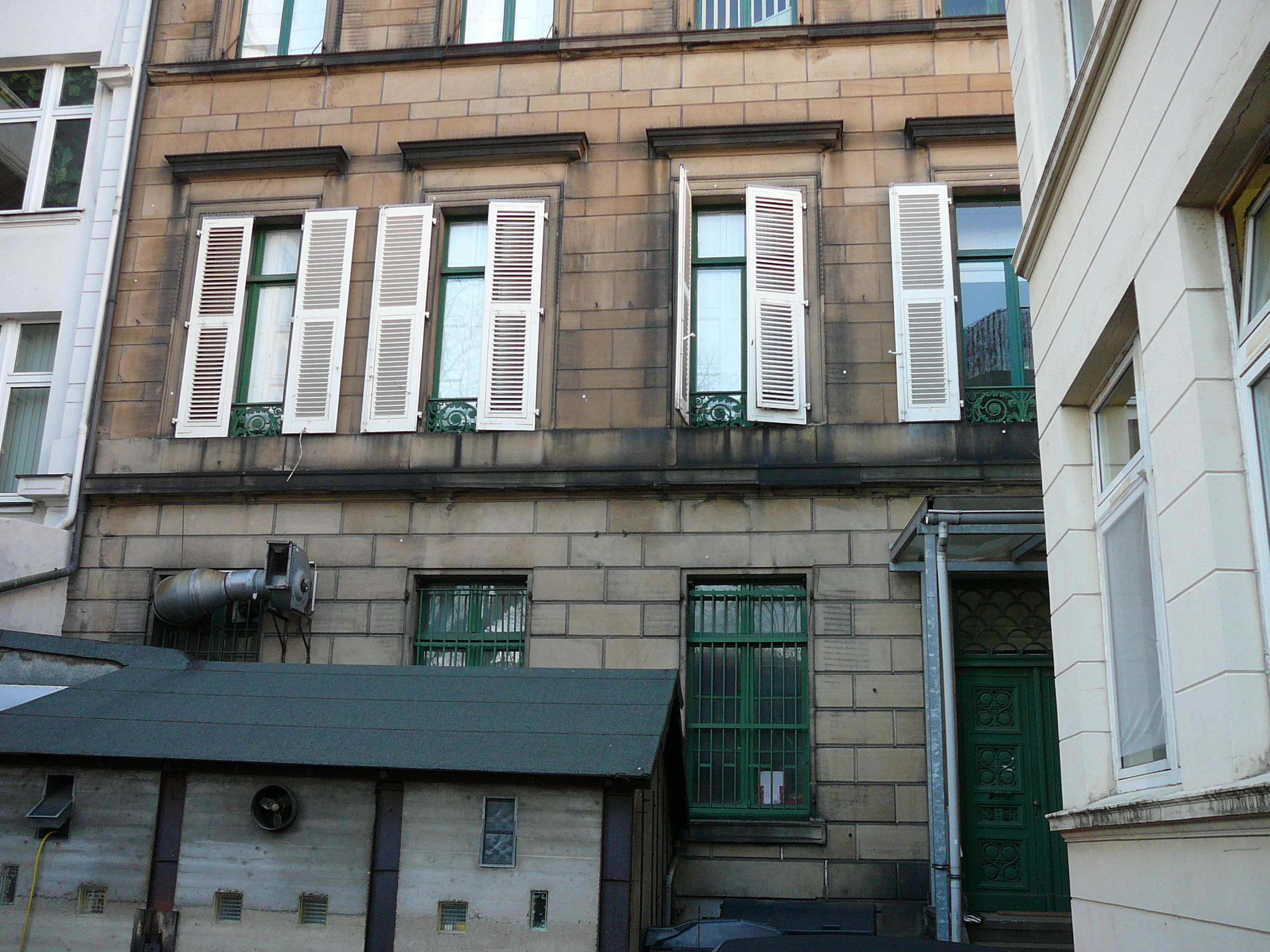 Villa in der Friedrich-Ebert-Str/Laurentisstr, Wuppertal